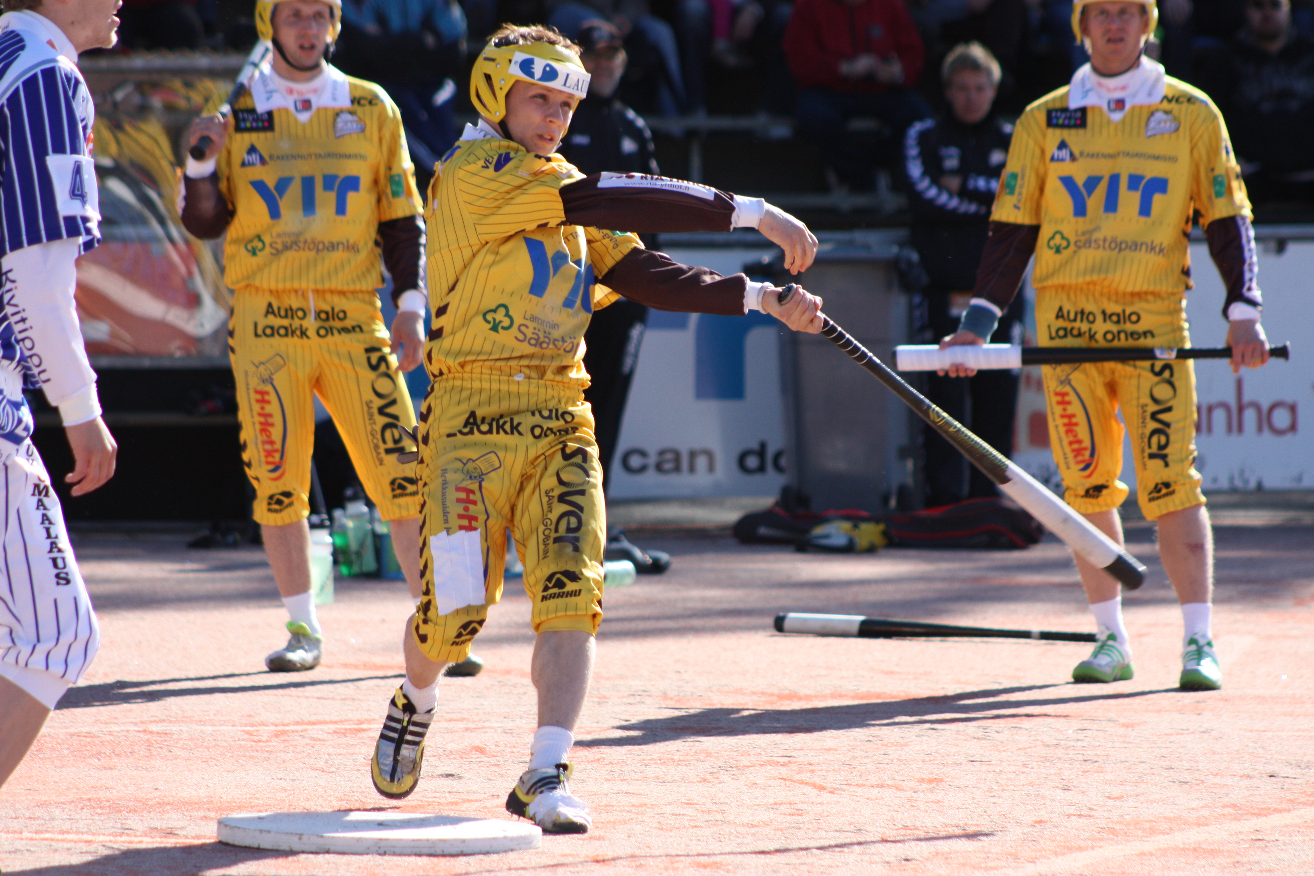 Tahko-Vimpeli 26.5.2011